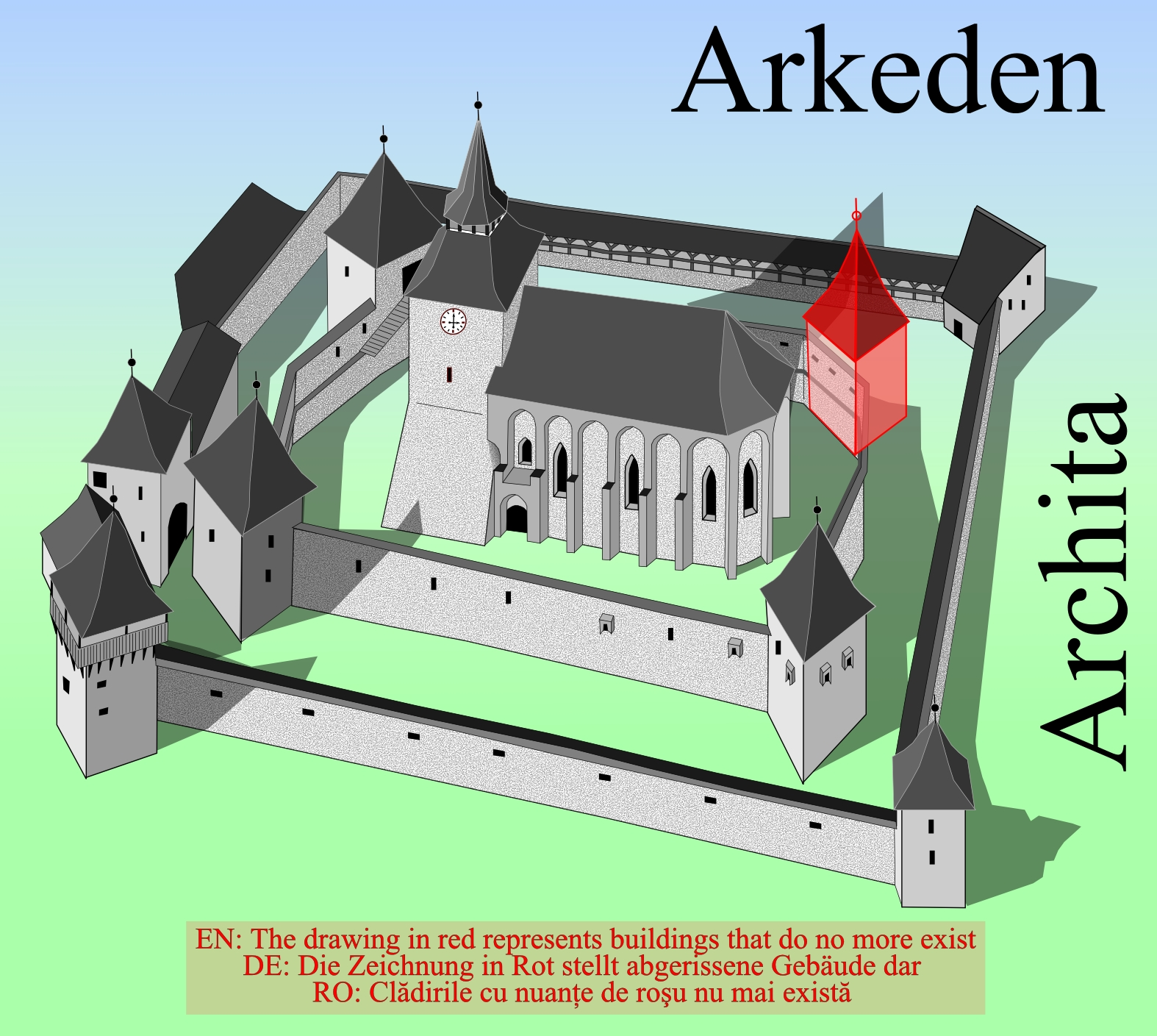 Biserica fortificata din Archita.